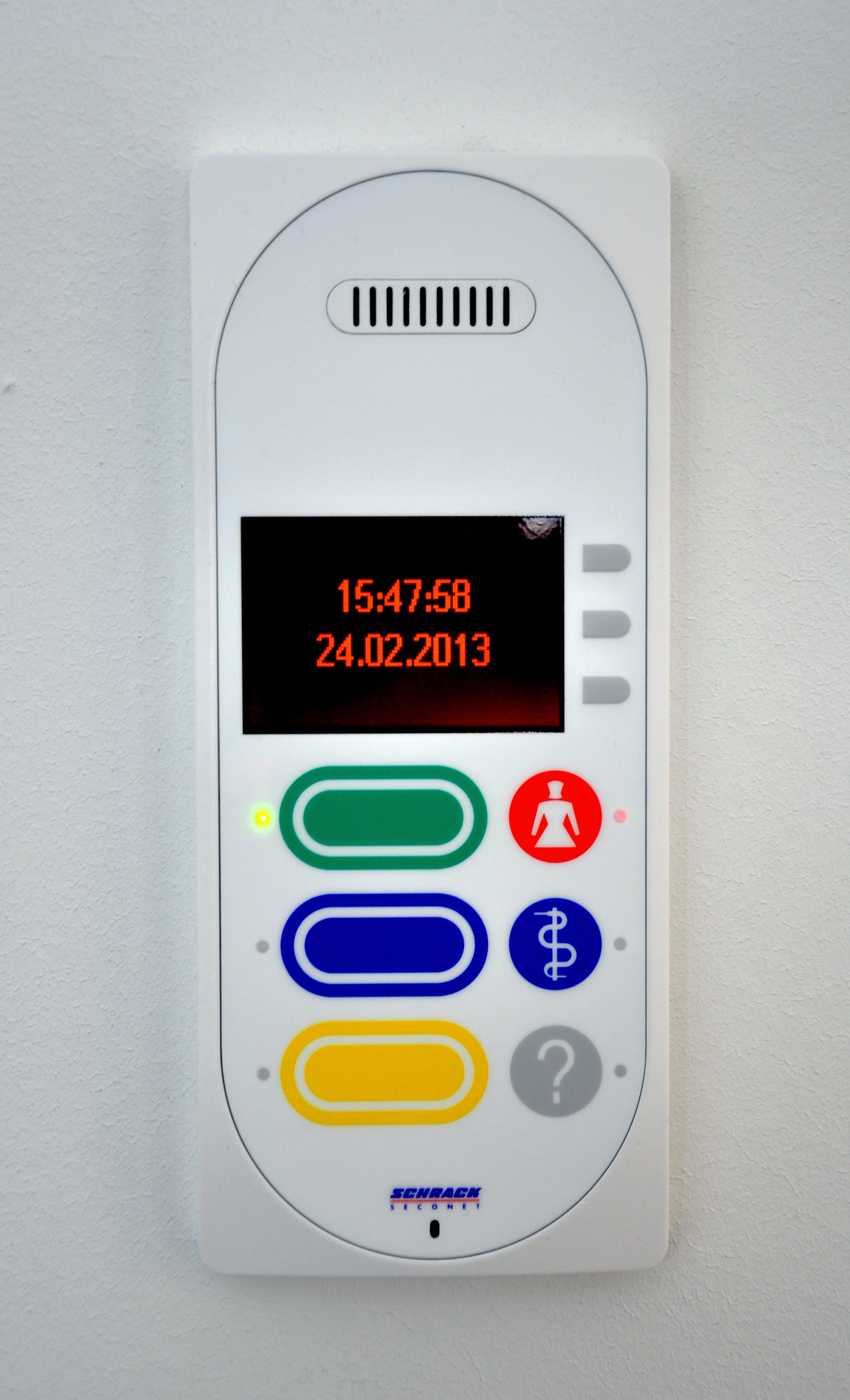 Ravensburg, Krankenhaus St. Elisabeth, Wand-Ruftaster in einem Krankenzimmer im neuen Bettenhaus (am Tag der offenen Tür 2013)